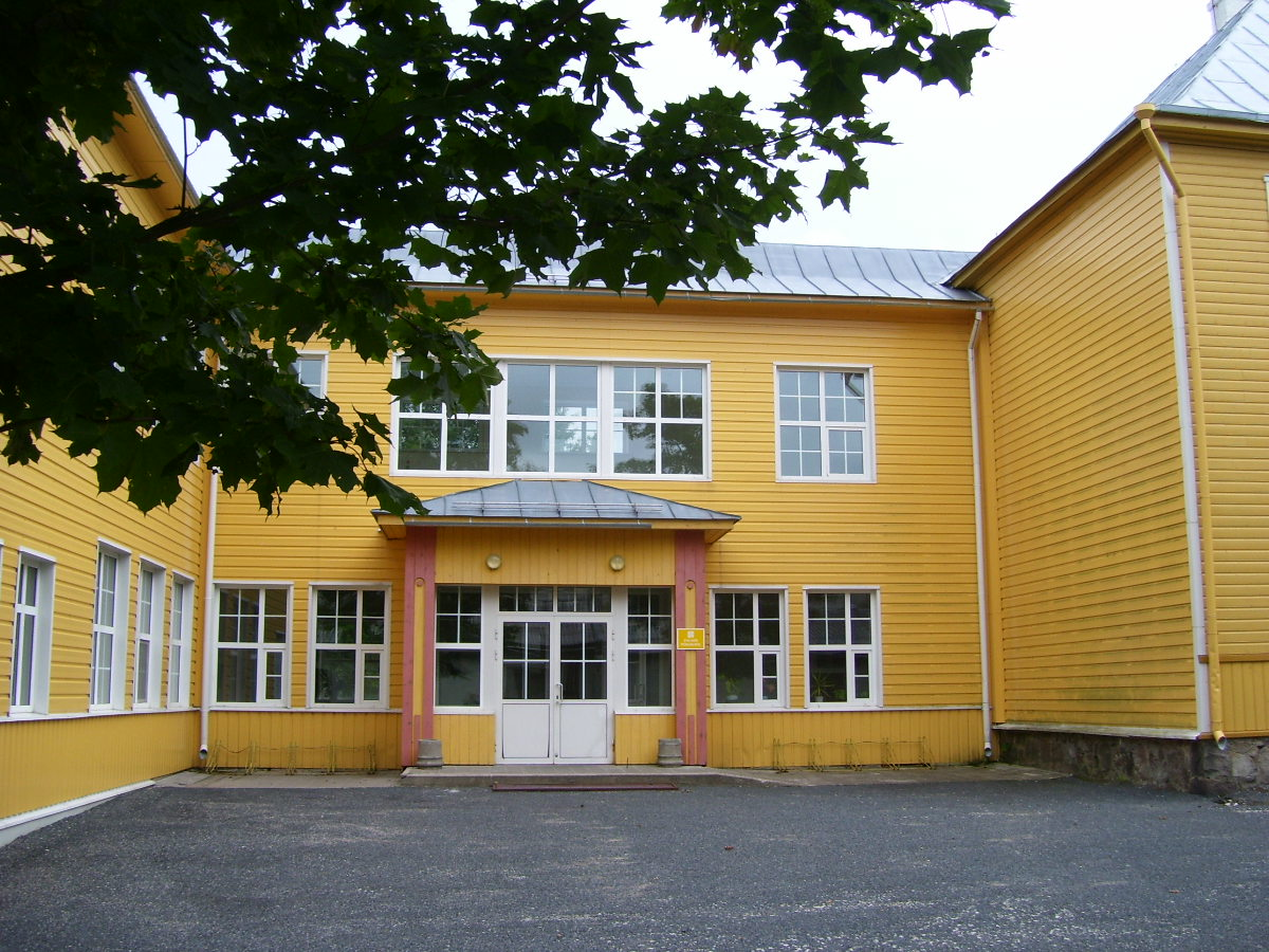 Palade Põhikool, Pühalepa vald